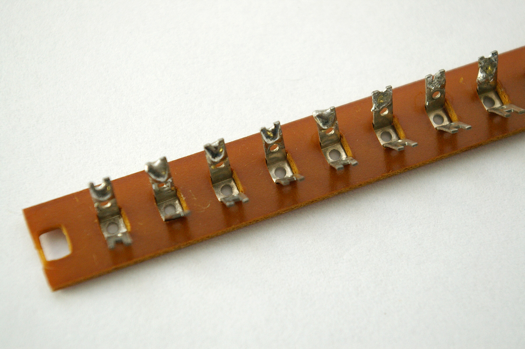 Einreihige Leiste aus Isolierstoff (Pertinax) mit eingeclipsten Lötstützpunkten zur freien Verdrahtung von Baugruppen und bedrahteten Bauelementen